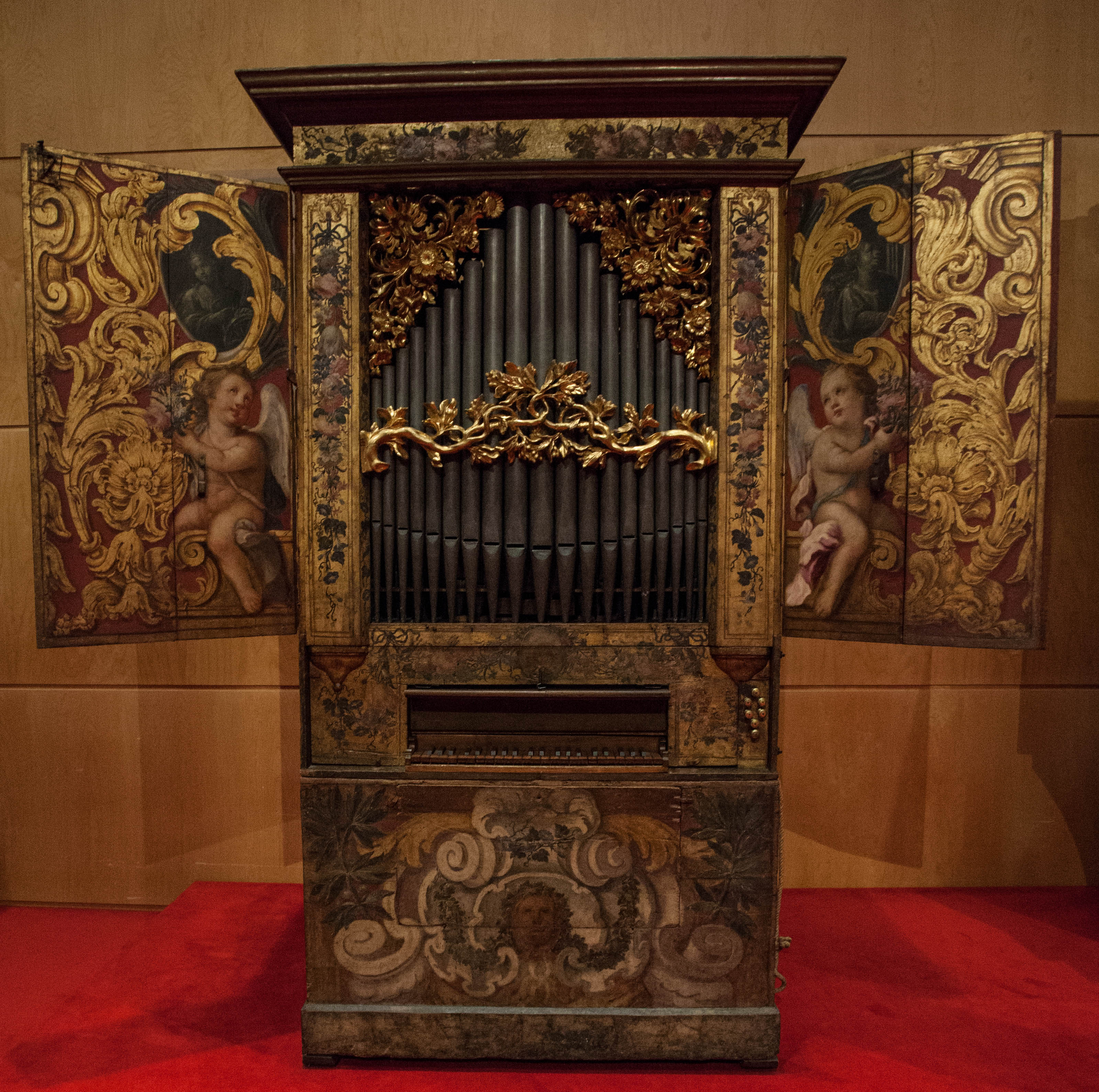 Orgue, Josep Boscà, MDMB 55